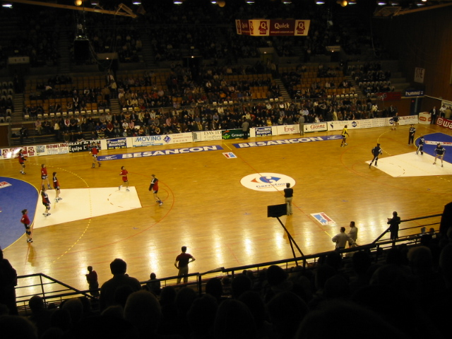 Match de Handball féminin avec l'ESB au Palais des Sports de Besancon